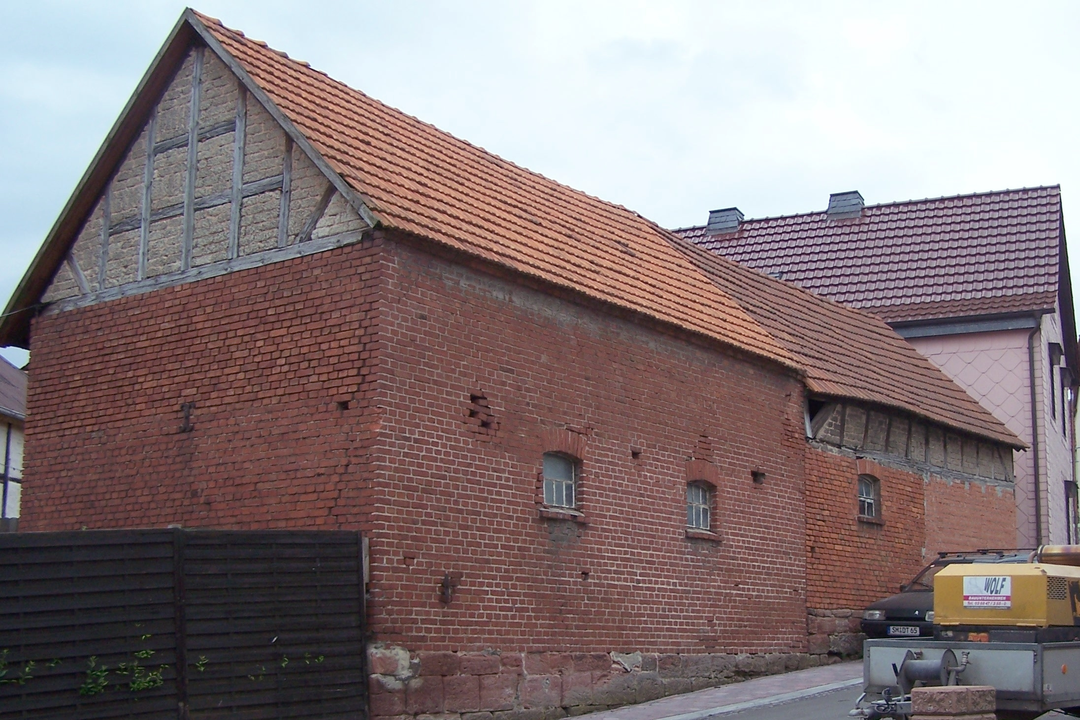 Ein Nebengebäude an der Hauptstraße in der Ortslage Urnshausen.